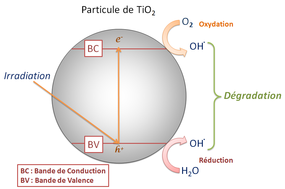 Schéma gsur le principe de la photocatalyse